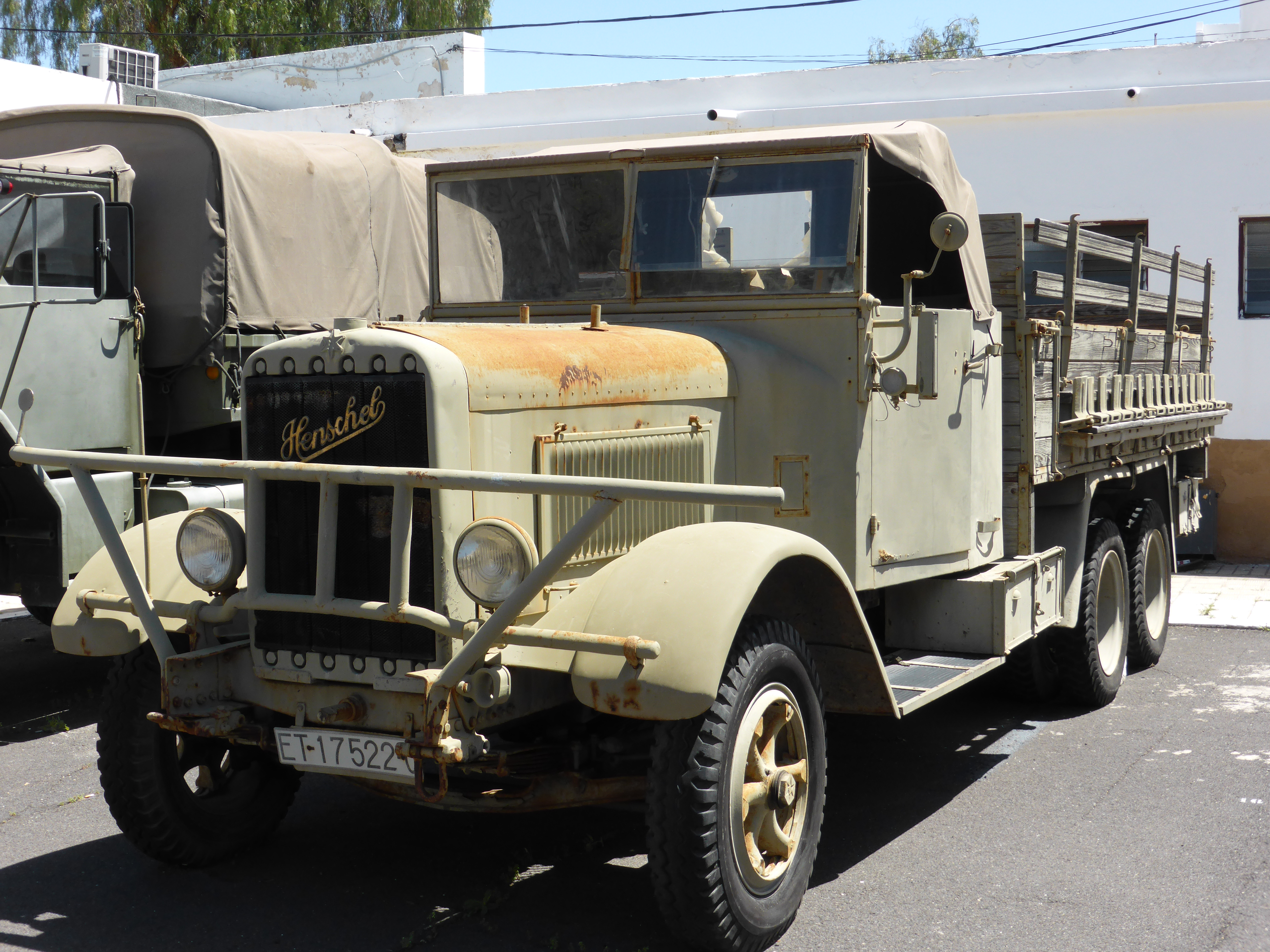 Camión pesado fabricado en Alemania por Henschel und Sohn, entre los años 1934 y 1937. Se encuentra estacionado en el Fuerte de Almeyda, de Santa Cruz de Tenerife (España), en la sede del "Museo Histórico Militar de Canarias". Este camión llegó a Tenerife en el año 1940 y fue empleado por el Ejército de Tierra.